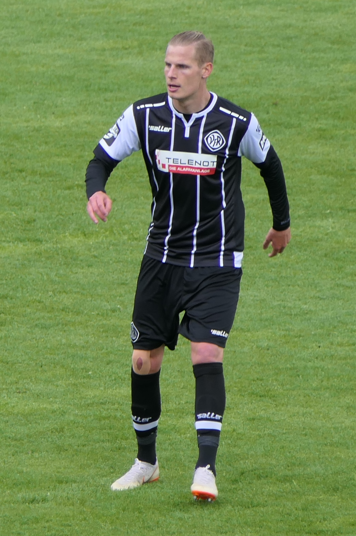 Der Fussballprofi Patrick Schorr im Trikot des VfR Aalen beim Heimspiel gegen Eintracht Braunschweig am 05.05.2019.